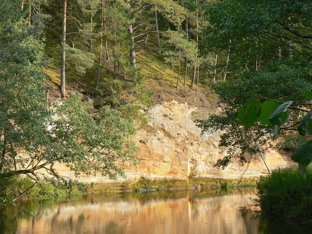 Viira veskimüür